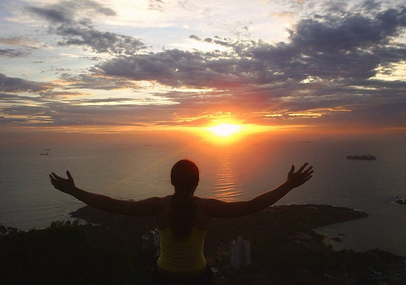 Foto tirada durante o nascer do sol por Daniele Rodrigues, no Morro do Moreno